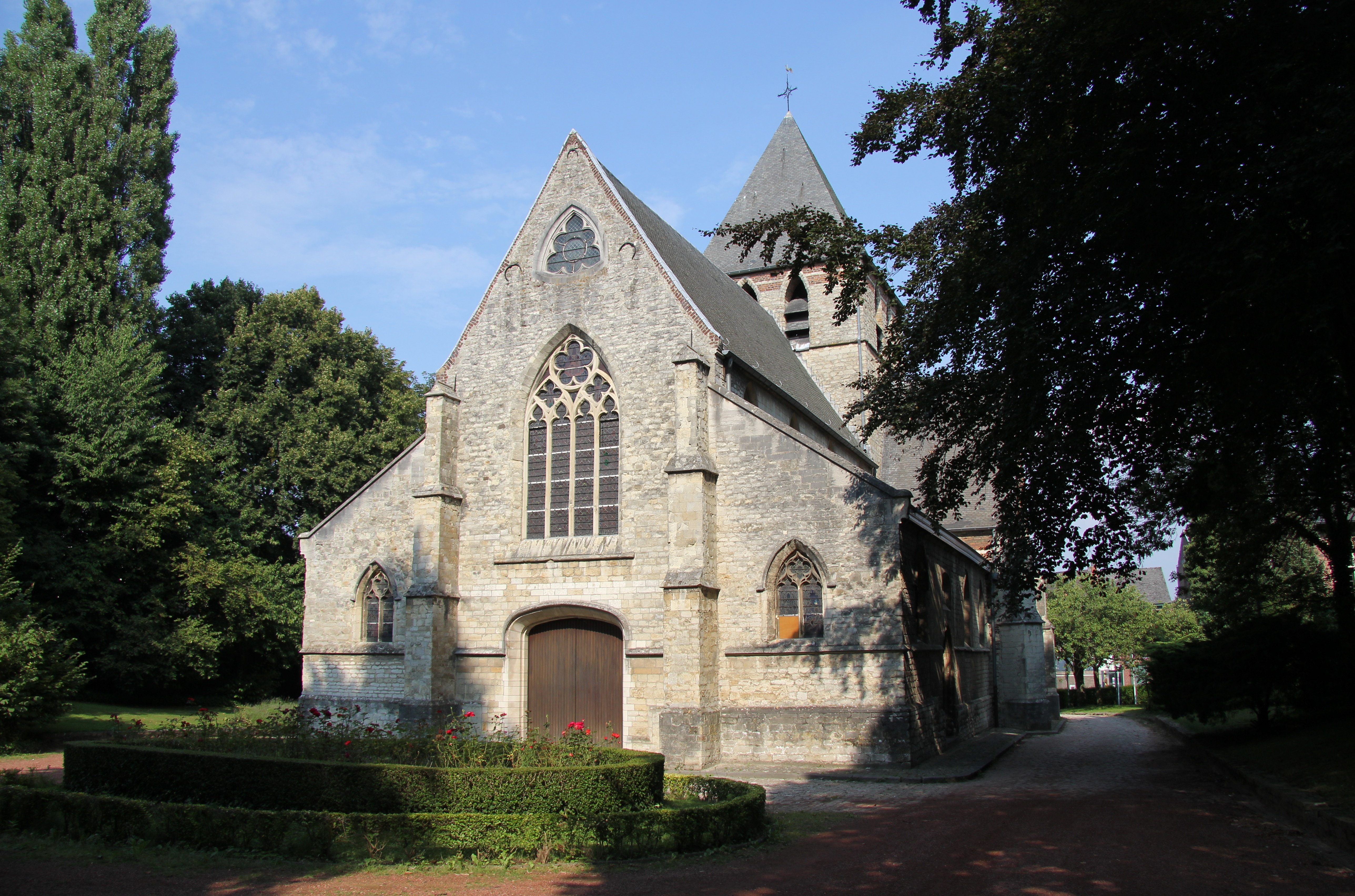 Drogenbos Parochiekerk St.-Niklaas vóór restauratie